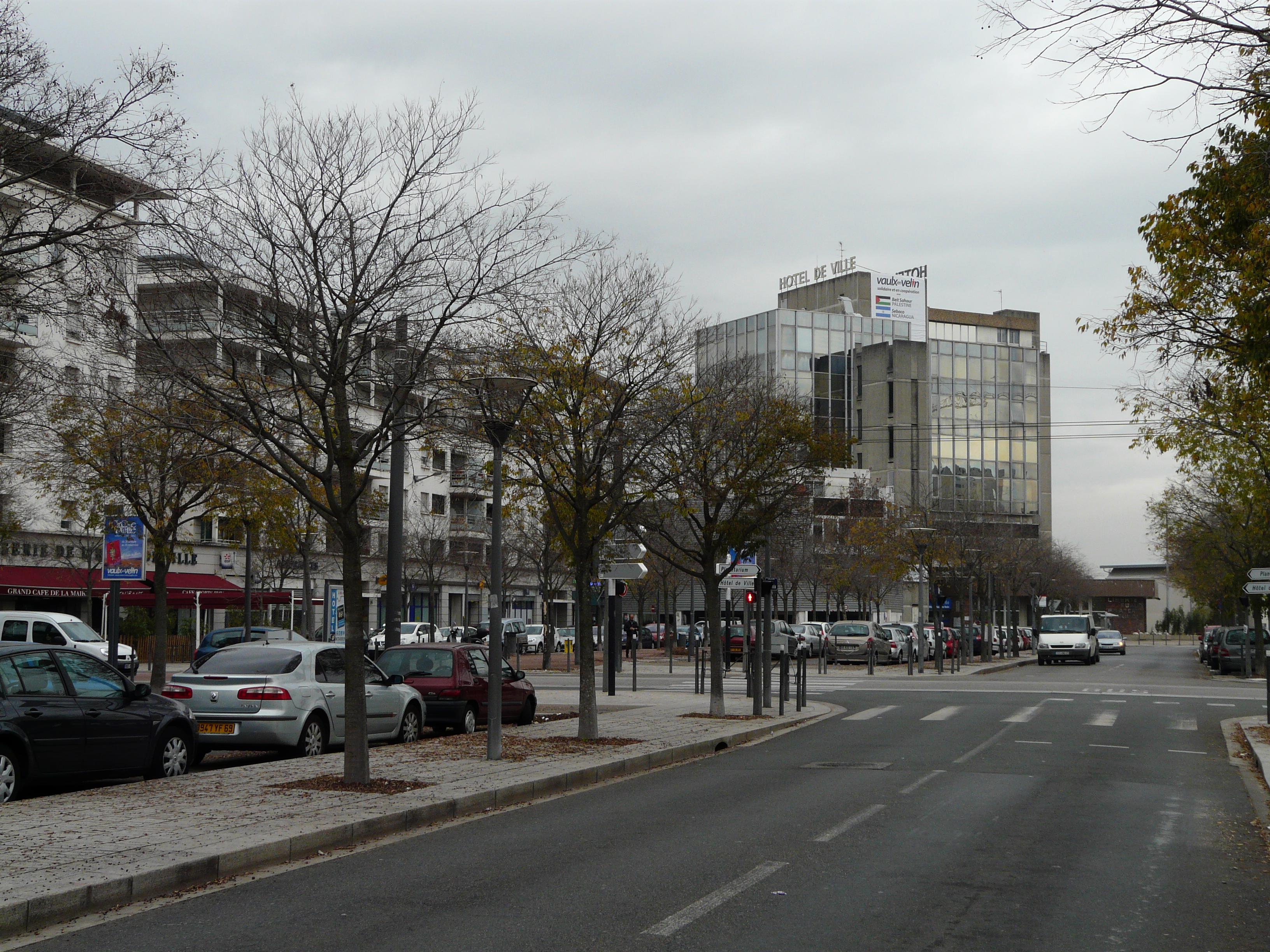 L'hôtel de ville et le centre de Vaulx-en-Velin (Rhône)